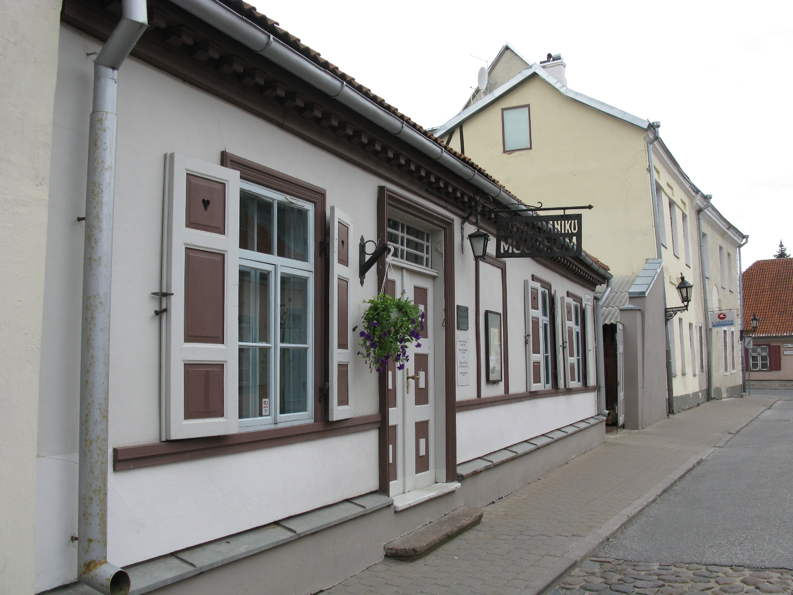 19. sajandi linnakodaniku muuseum Tartus Jaani tänavas, 20. juuli 2012. Foto: Oop.